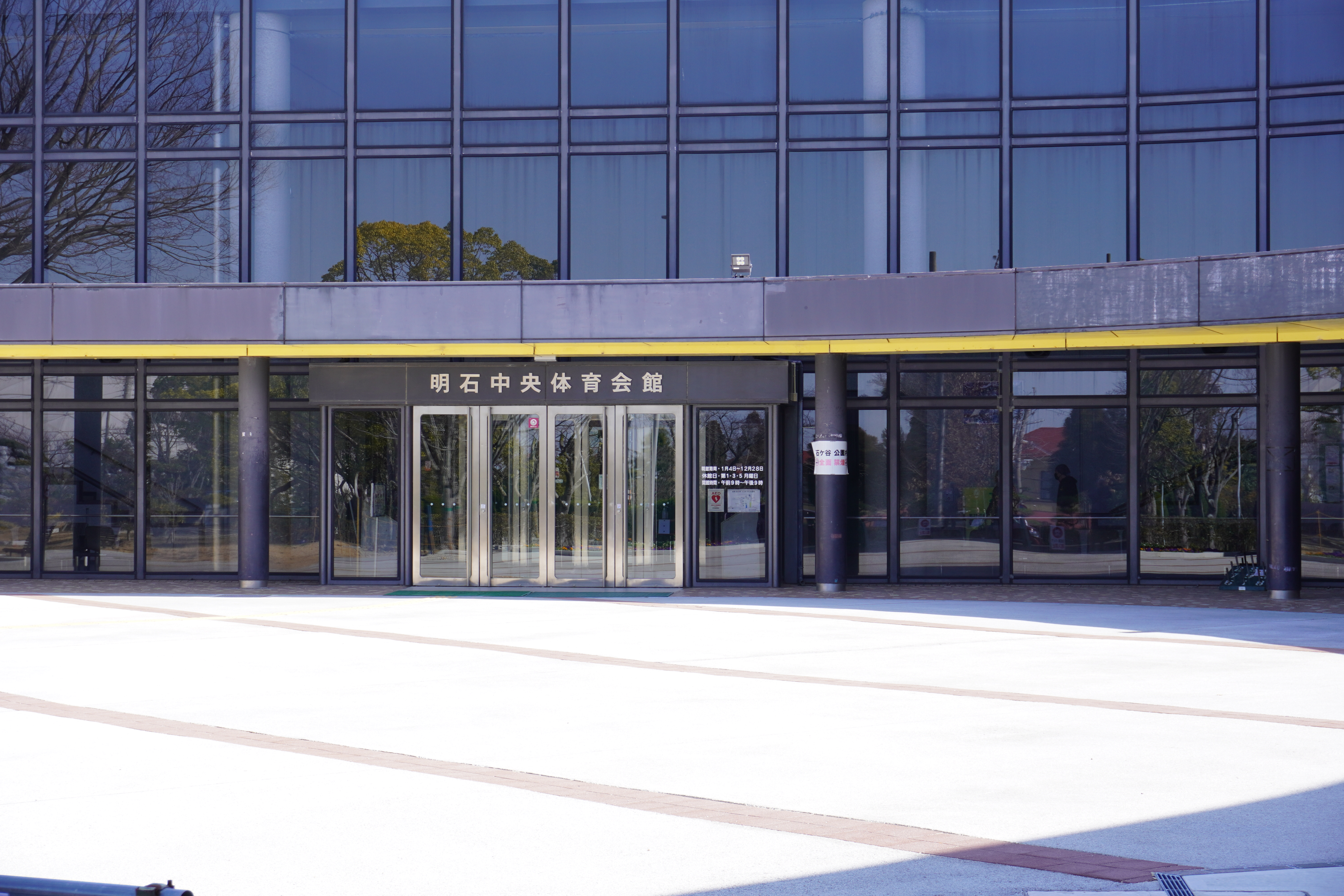 明石中央体育会館正面